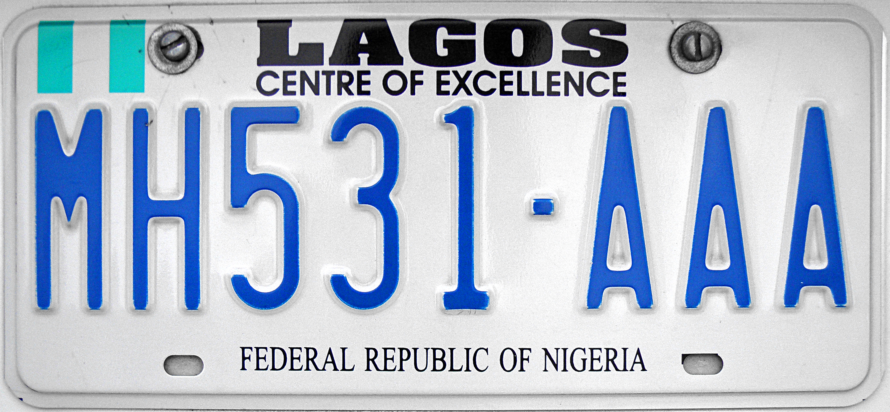 Matrícula del estado de Lagos, Nigeria.